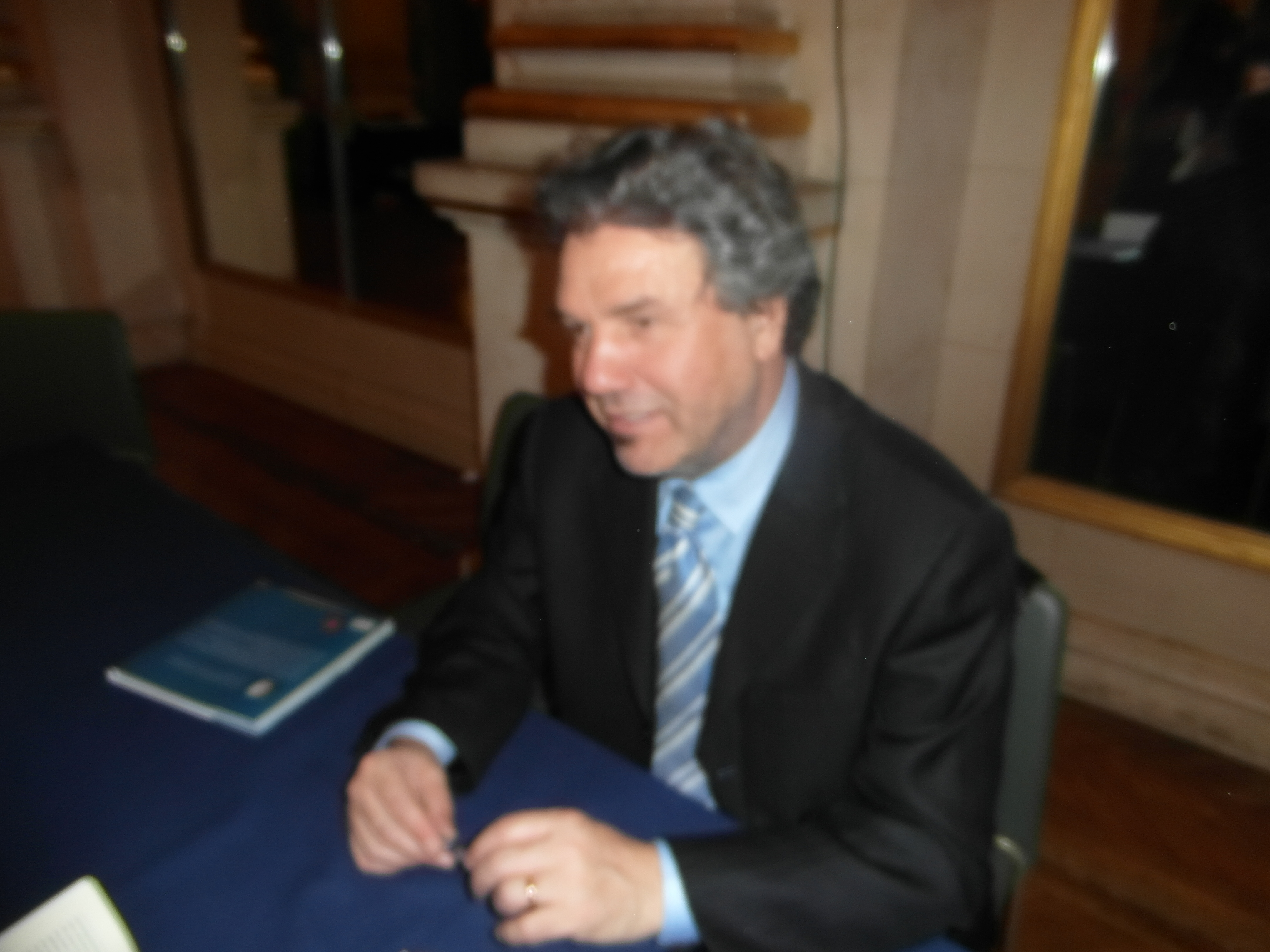 20e Maghreb des Livres, Paris, 8 février 2014